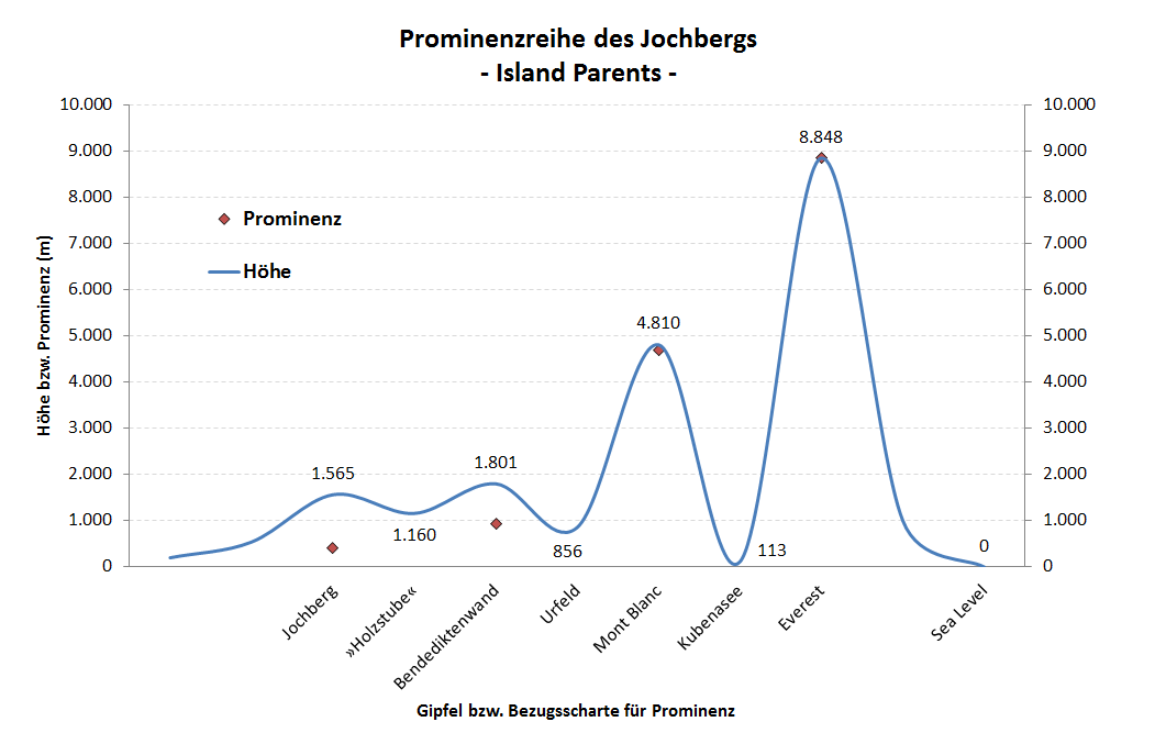 Prominenzreihe der Island Parents für den Jochberg in den Bayerischen Voralpen. Die Schartenhöhe oder Prominenz eines Gipfels ergibt sich als Differenz aus seiner Höhe und der der höchstgelegenen Einschartung (Bezugsscharte), bis zu der man mindestens absteigen muss, um einen höheren Gipfel zu erreichen. Der Island Parent ist der höchste Gipfel, der ausgehend von der jeweiligen Bezugsscharte über einen in jedem Punkt ansteigenden Weg erreicht werden kann. Er ist der nächsthöhere Berg, dessen eigene Bezugsscharte niedriger liegt als die des betrachteten Gipfels.